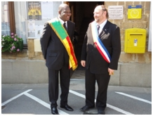 Lors de la signature de la chartre de jumelage